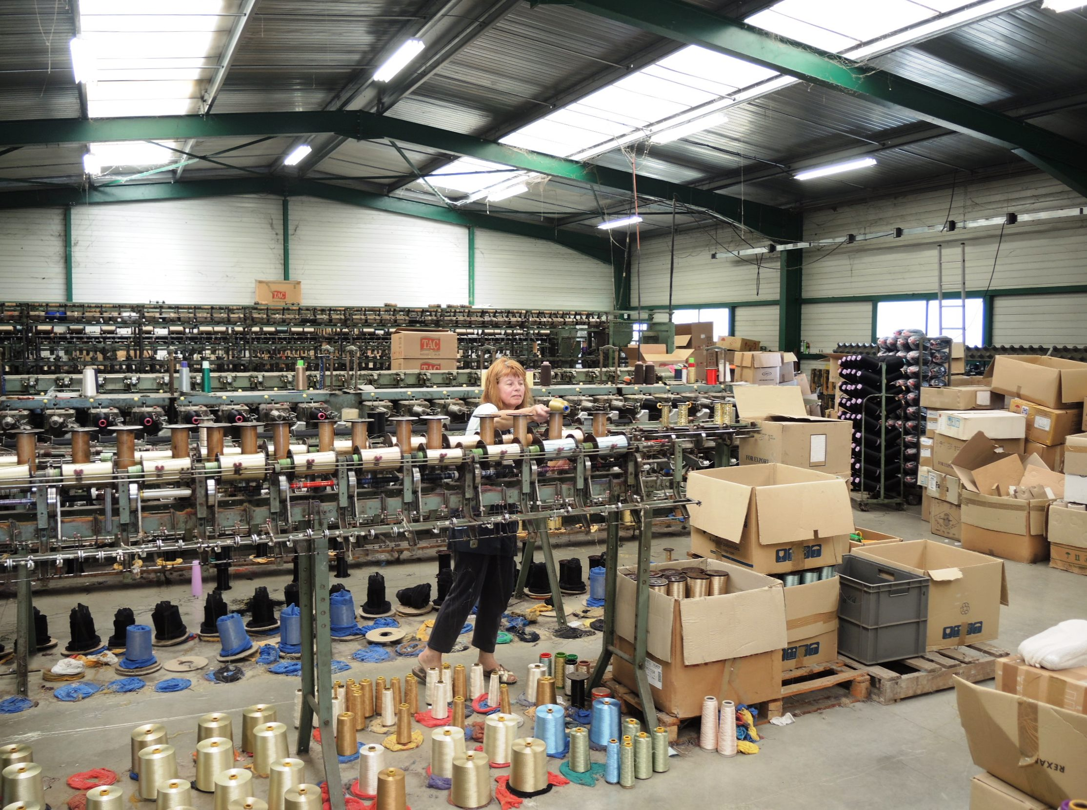 Vinzieux détail